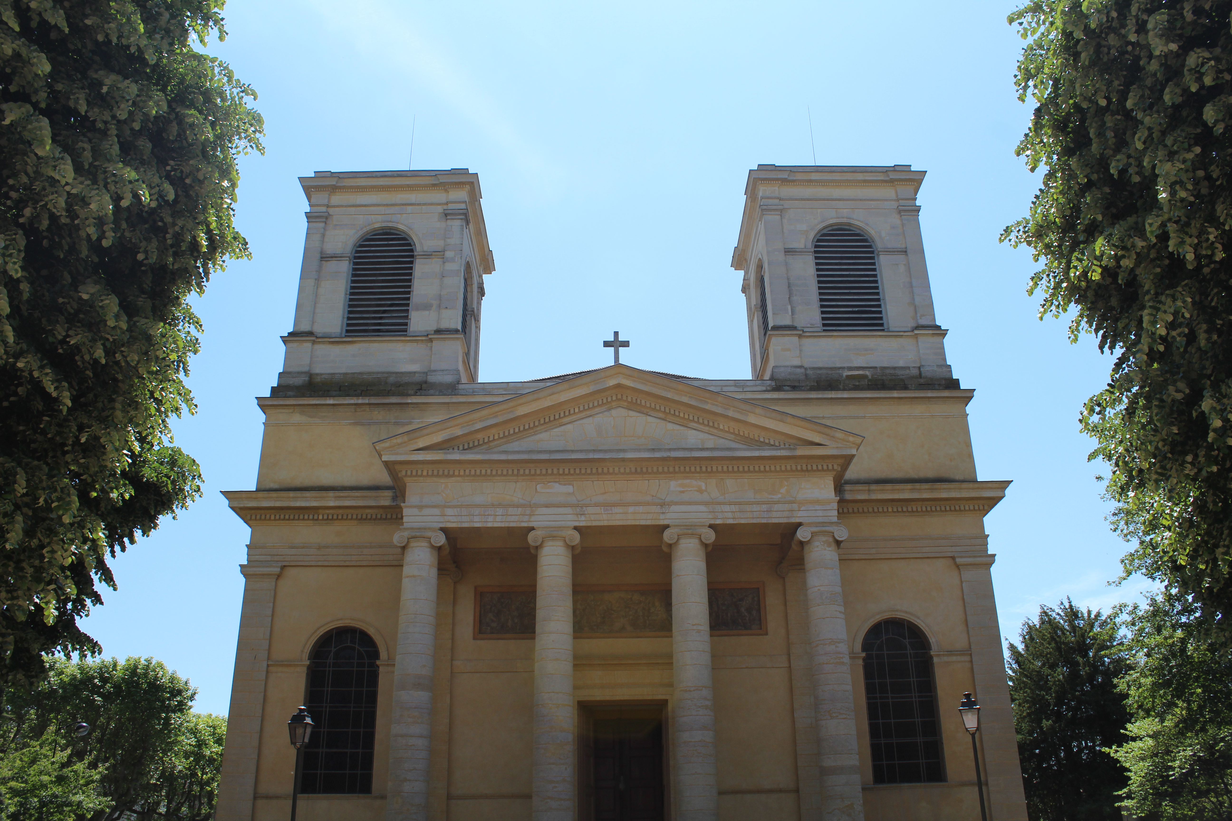 Entrée de l'église Saint-Vincent de Mâcon.